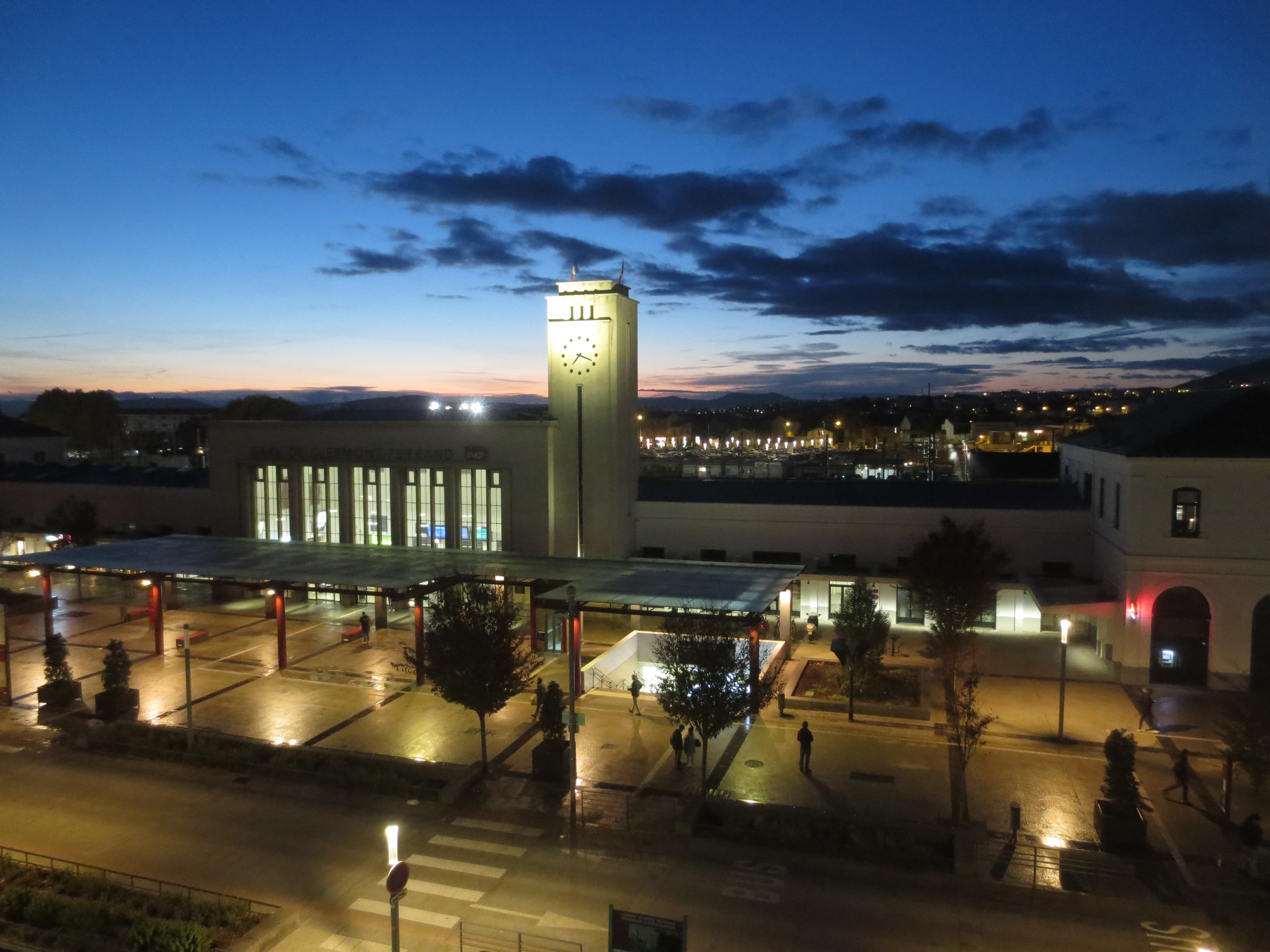 Gare de Clermont-Ferrand le matin